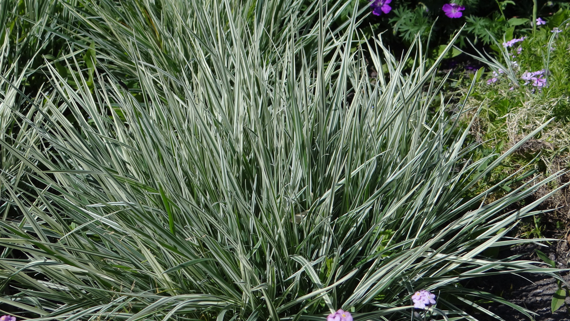 Arrhenatherum elatus `Albo variegatum`